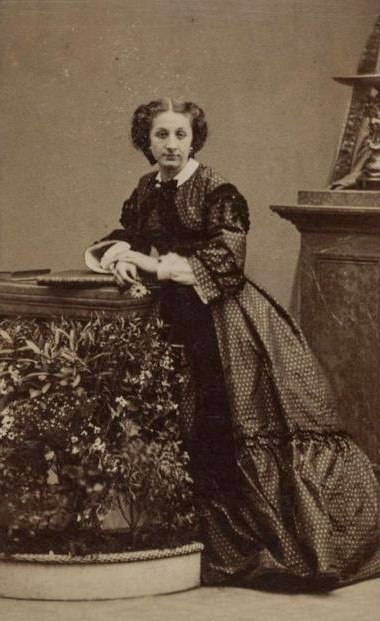 Мария Евгения Алиса де Брессан (1838—1909), с 1867 года жена князя М. В. Кочубей